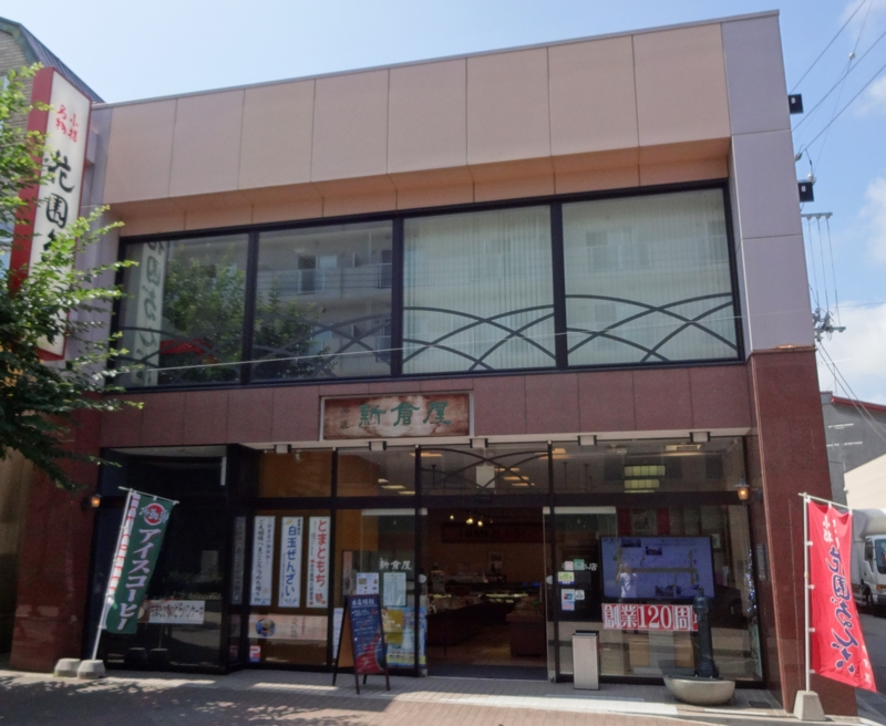 新倉屋 (Wagashi shop, Otaru-shi, Japan)